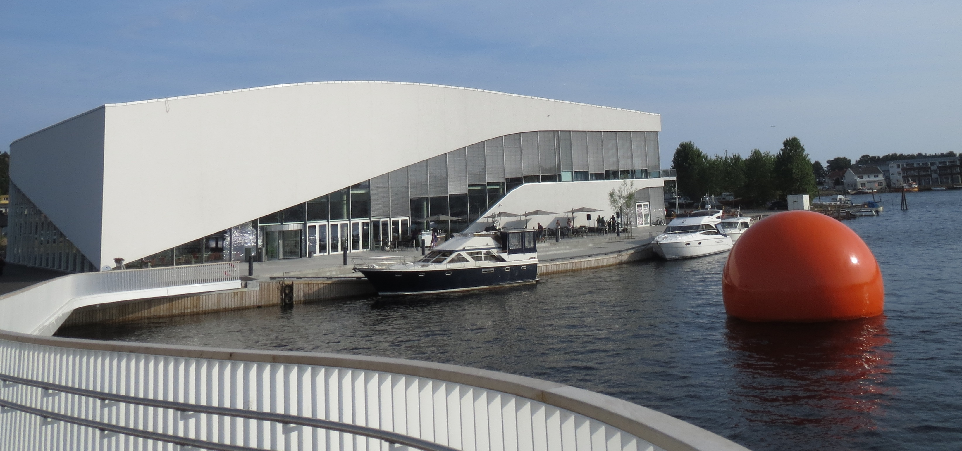 Kulturhuset Buen i Mandal i Vest-Agder